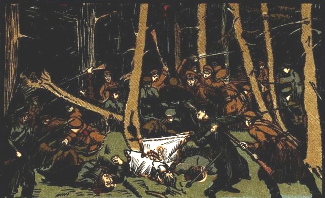 В Августовском лесу. Эпизод Первой мировой войны на Восточном фронте.